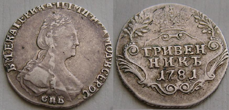 Гривенник 1781 года, СПБ- монетный двор Санкт-Петербурга, серебро(Ag)750, вес 2,37 грамм.